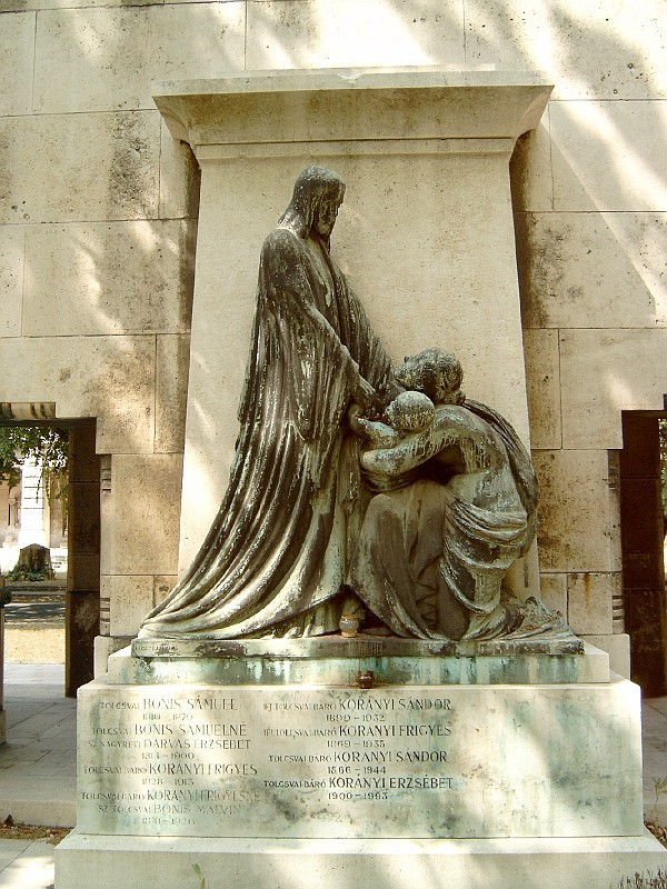 Korányi Frigyes és Korányi Sándor síremléke Budapesten, a Kerepesi temetőben (Árkád jobb 45). - Árkádos temetőépületek a bennük álló síremlékekkel, Krátky-Könyöki-Gerle-Heuffel-Berényi, Hőgyes Endre, Korányi Sándor és Korányi Frigyes, a Gundel-család, Jungfer Gyula sírjai. 1905-1908. This is a photo of a monument in Hungary. Identifier: 928